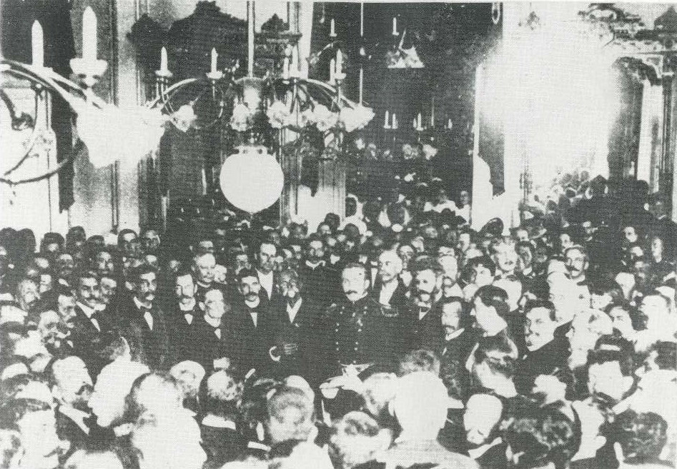 En el acto de toma de posesión de Tomás E. Palma en el Palacio de los Capitanes Generales, mayo de 1902.